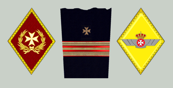 Emblemas de los Cuerpos de Sanidad (extinguidos) de los tres Ejércitos de España